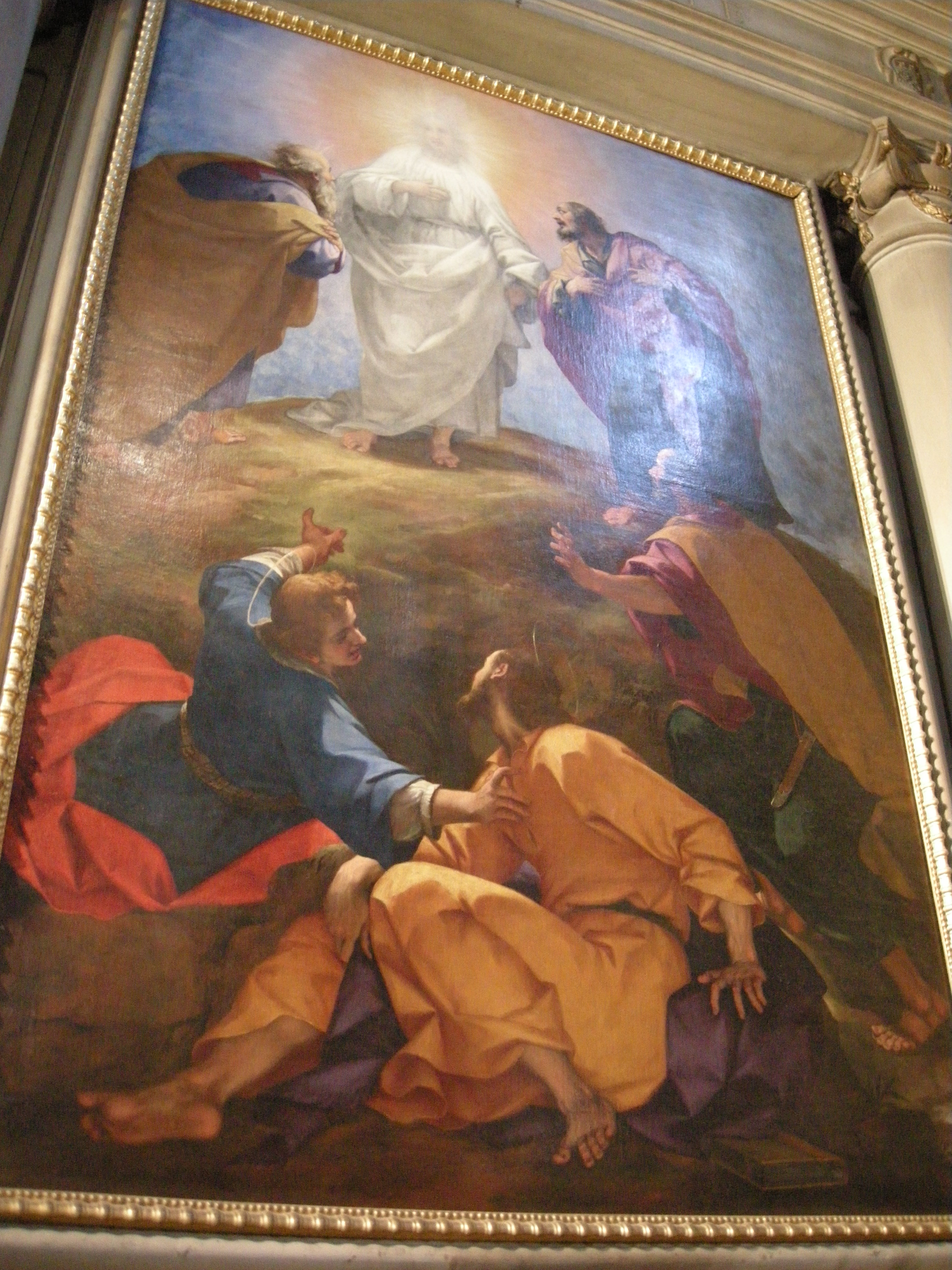 San marco, firenze, altare degli orafi, poi pandolfini, Giovanni Battista Paggi, trasfigurazione, 1596